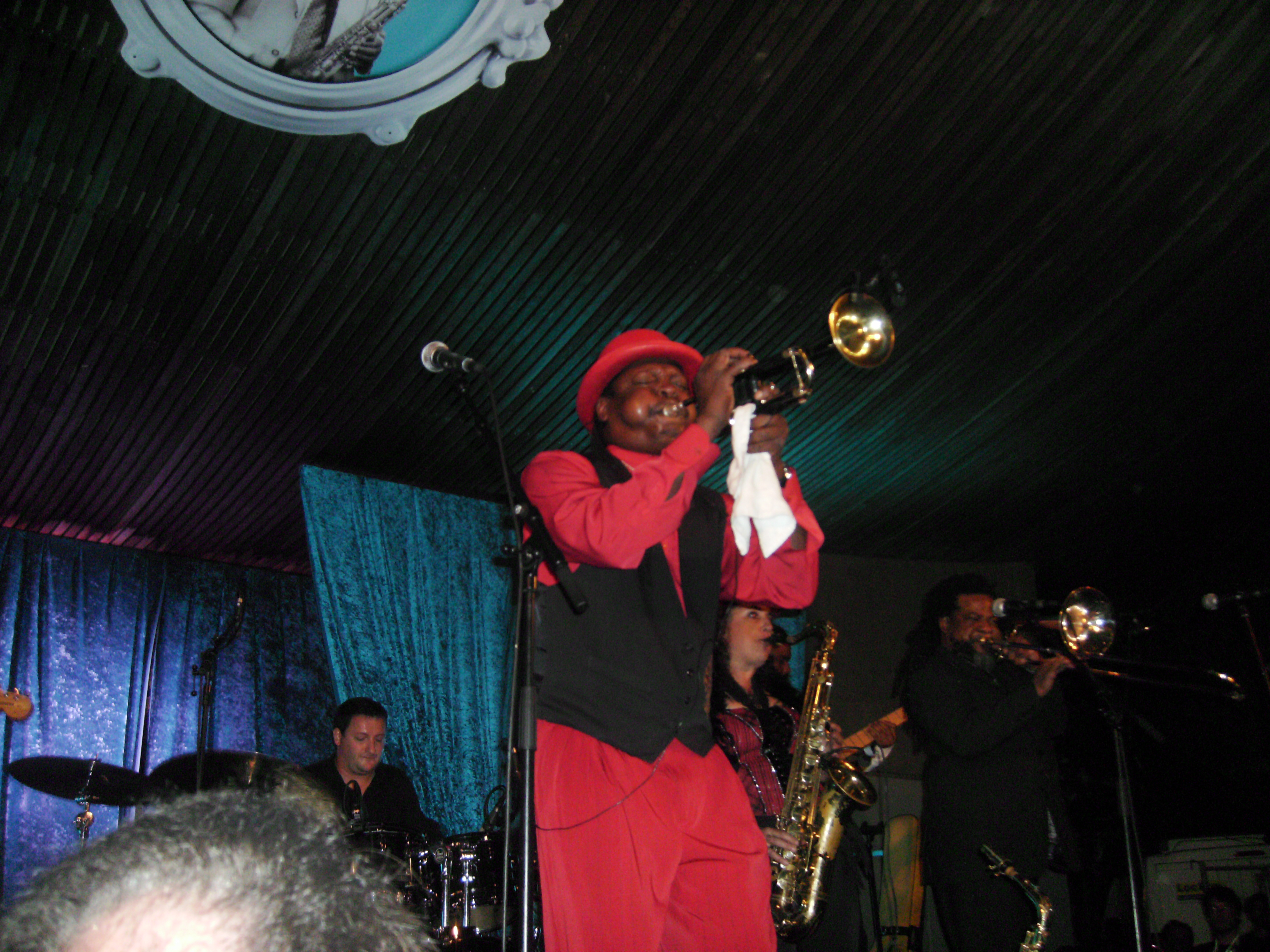 Boney Field rdv erdre nantes